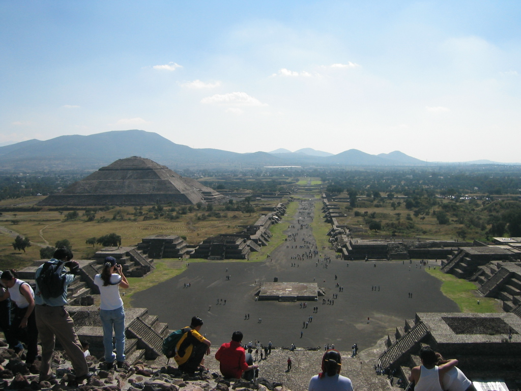 Vista de la Avenida de los Muertos desde la Pirámide de la Luna. Teotihuacan, Mexico. Tomada 11-2002 por fabioj. Categoría:México (imagen)